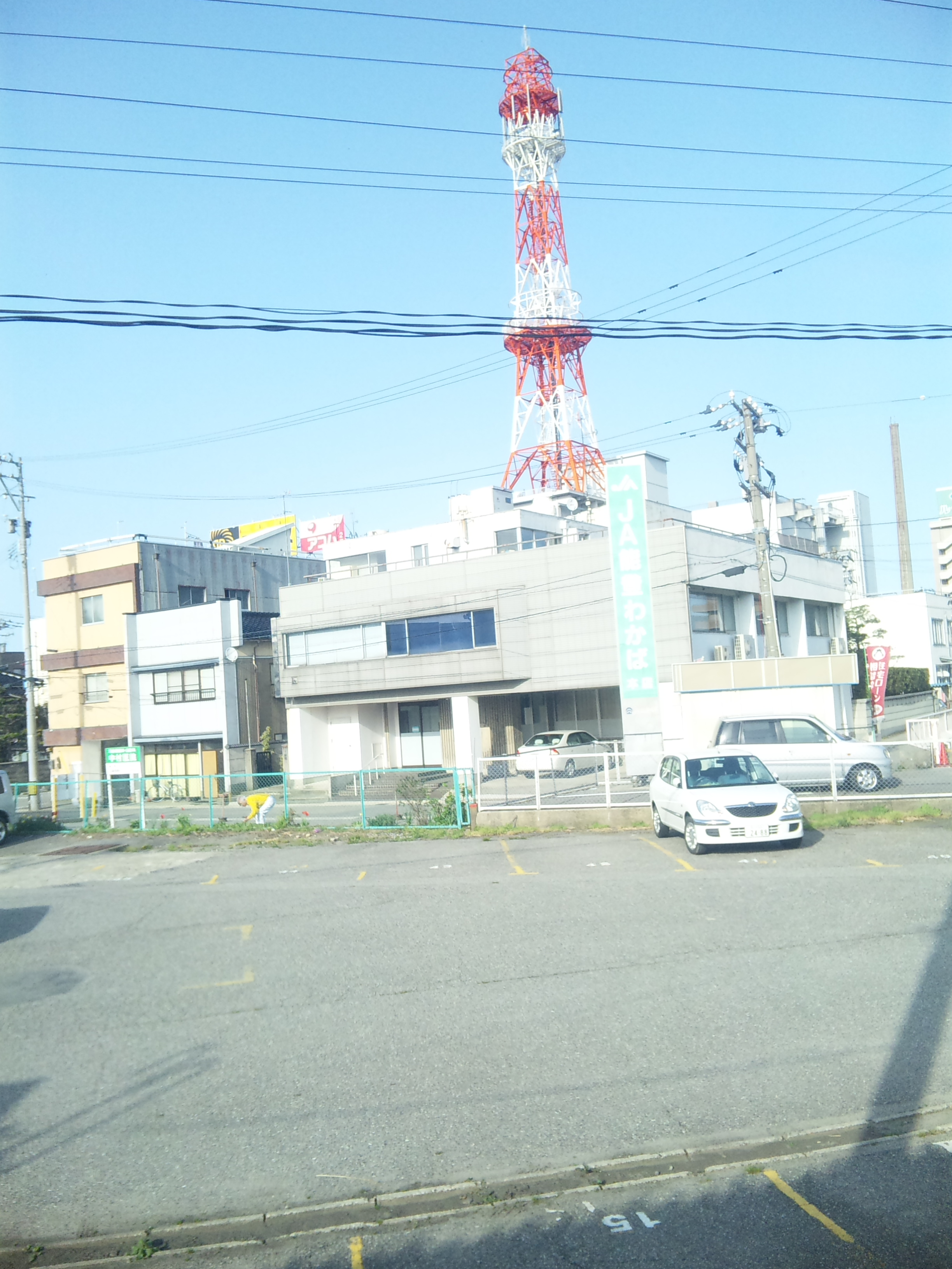 JA能登わかば本店.